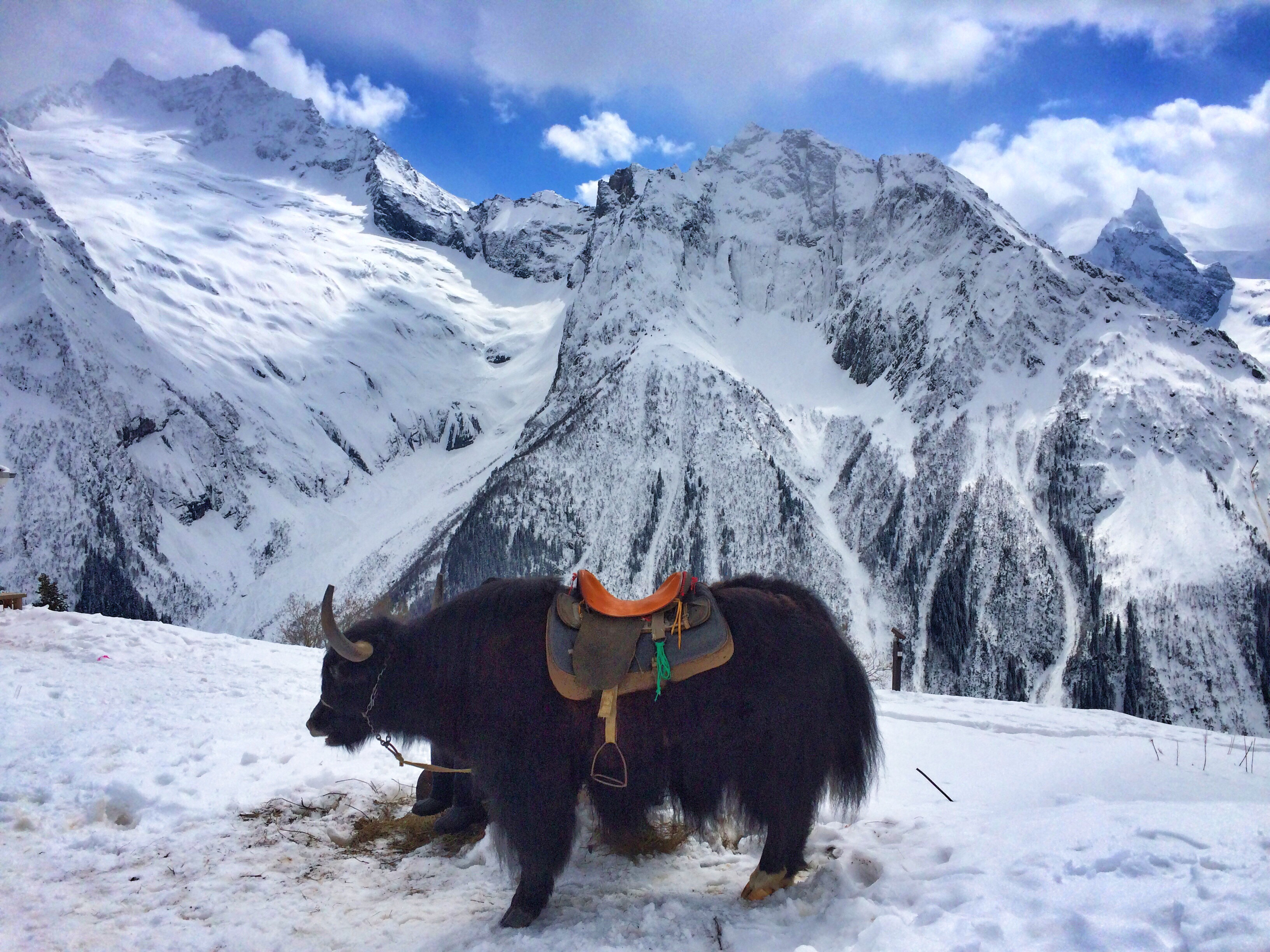 Теберда, Карачаевск Домбай. Вид на Главный Кавказский хребет This image is related to the protected area of Russia number 0900023